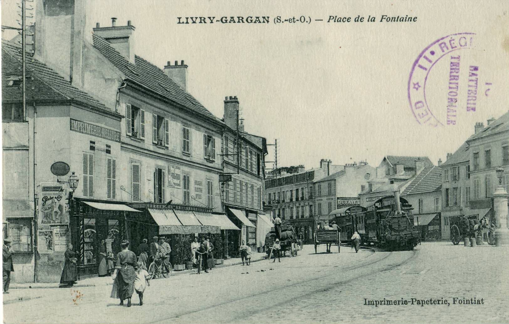 Carte postale ancienne éditée par Fointiat :LIVRY-GARGAN - Place de la Fontaine